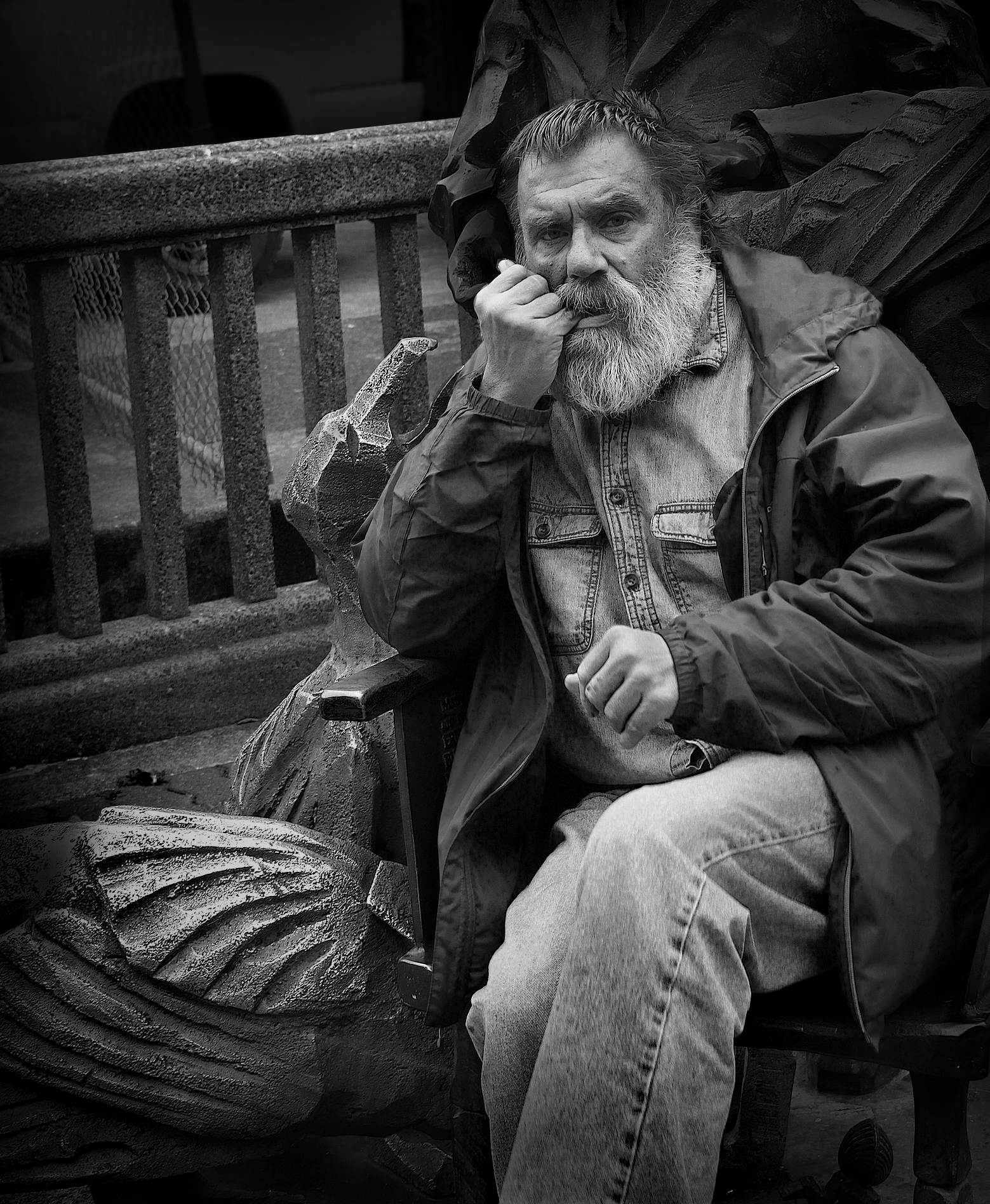 homeless